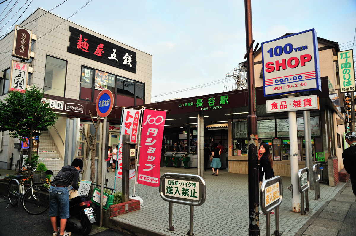 江之島電鐵 長谷車站